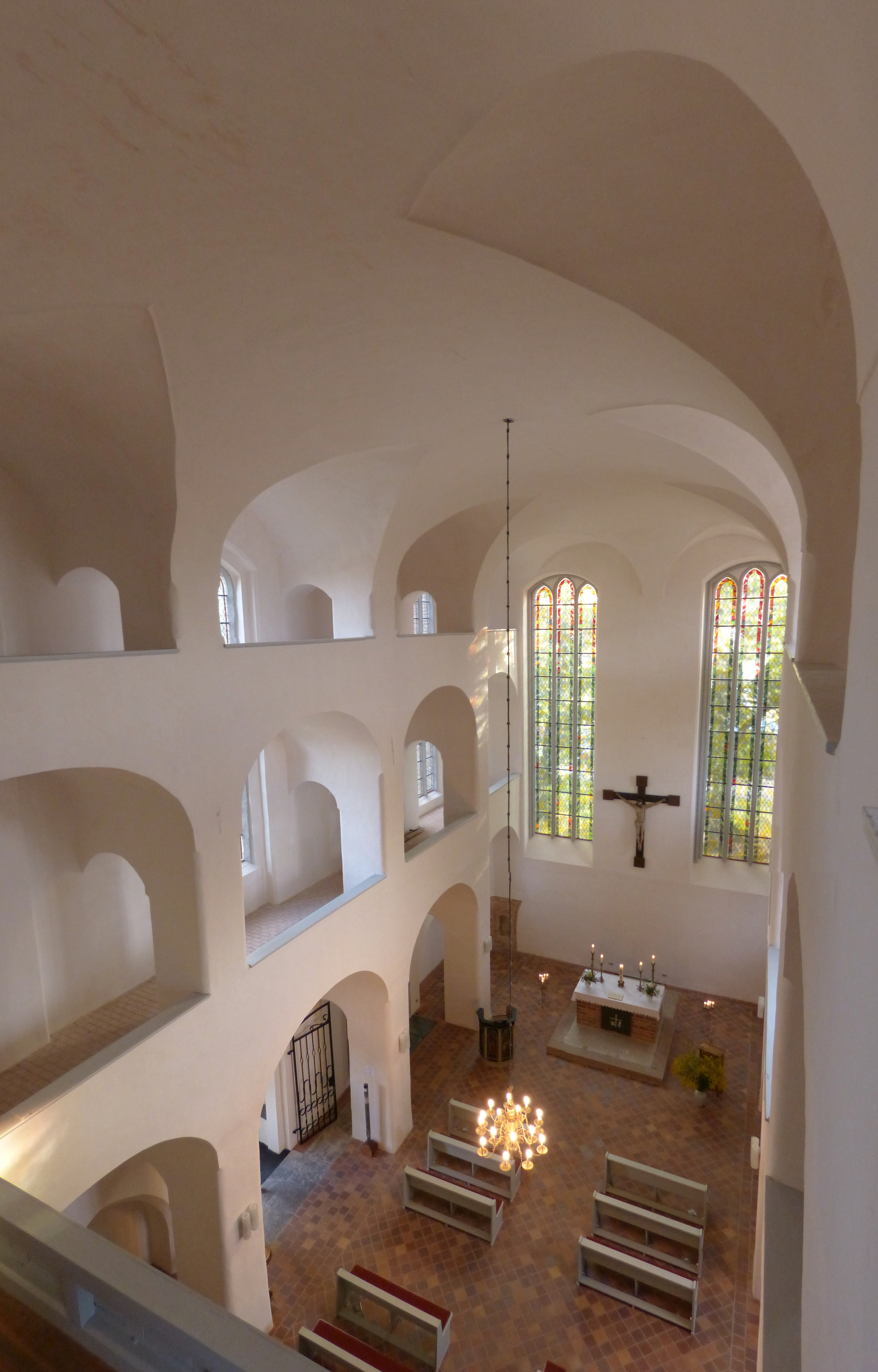 Kirche Franzburg, Nördliche Emporen, Ostseite mit Fenster, Altar, Kruzifix